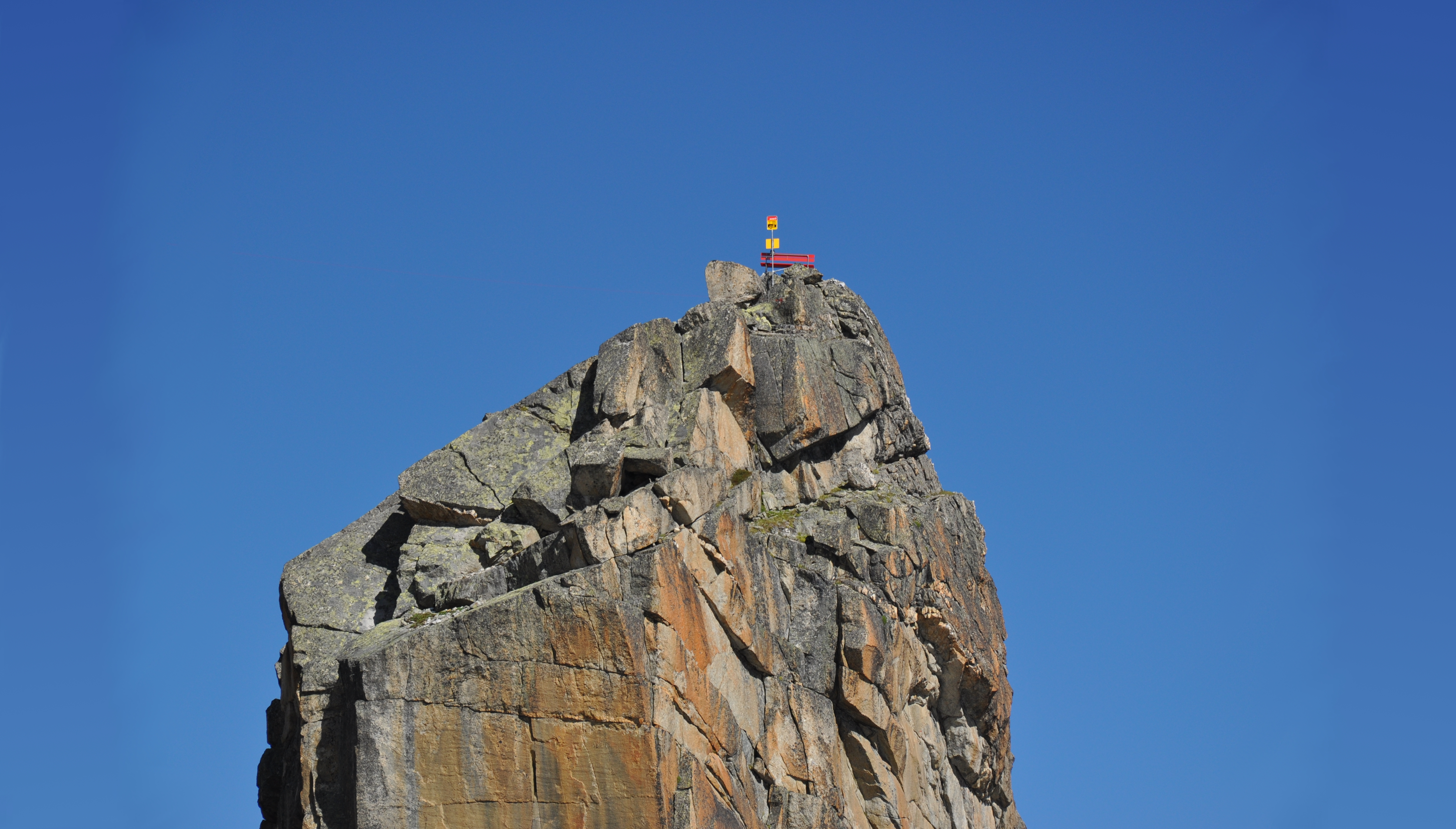 Aufnahme Hannibal mit Hanicity vom Nachbarsgipfel Nägeli (Rückseite Hannibal).